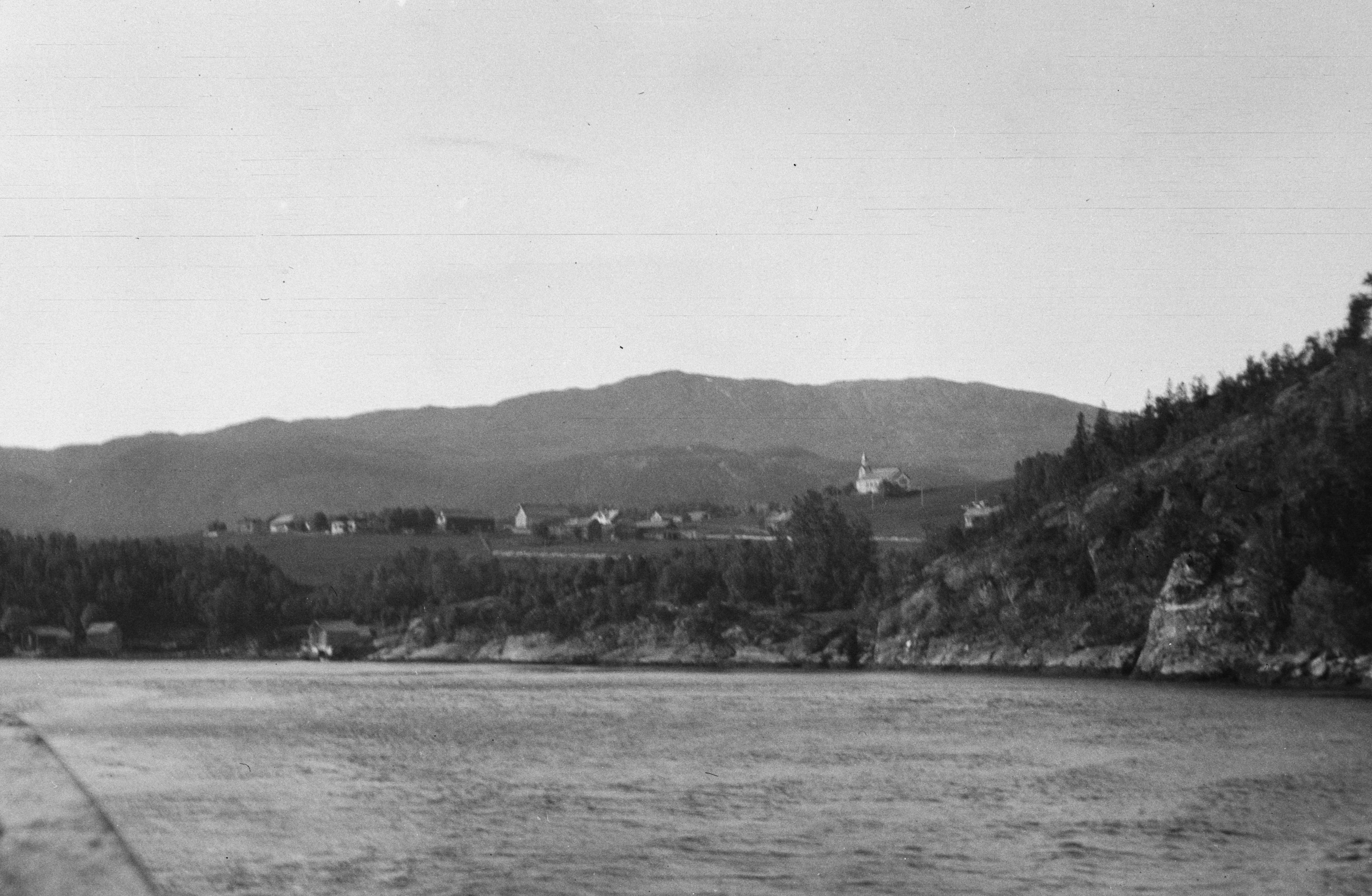 Utsikt fra skip mot Foldereid med Foldereid kirke.